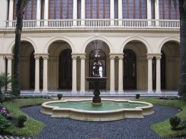 Patio de las Palmeras, en la Casa Rosada (Argentina)